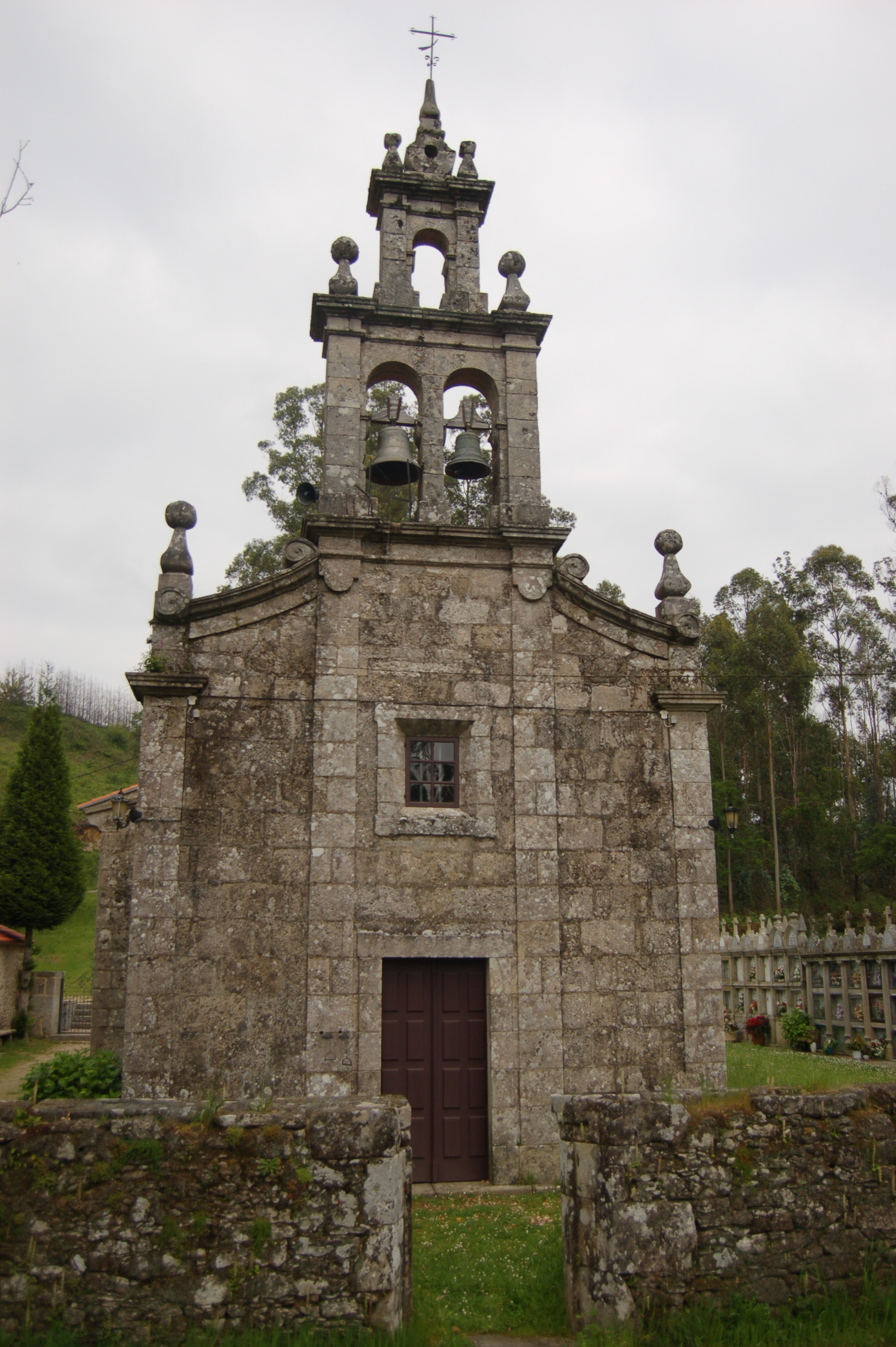 Igrexa parroquial de San Martiño de Gargantáns (Moraña)